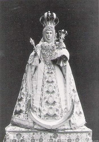 Nuestra Señora del Rosario Coronada siglo XIX